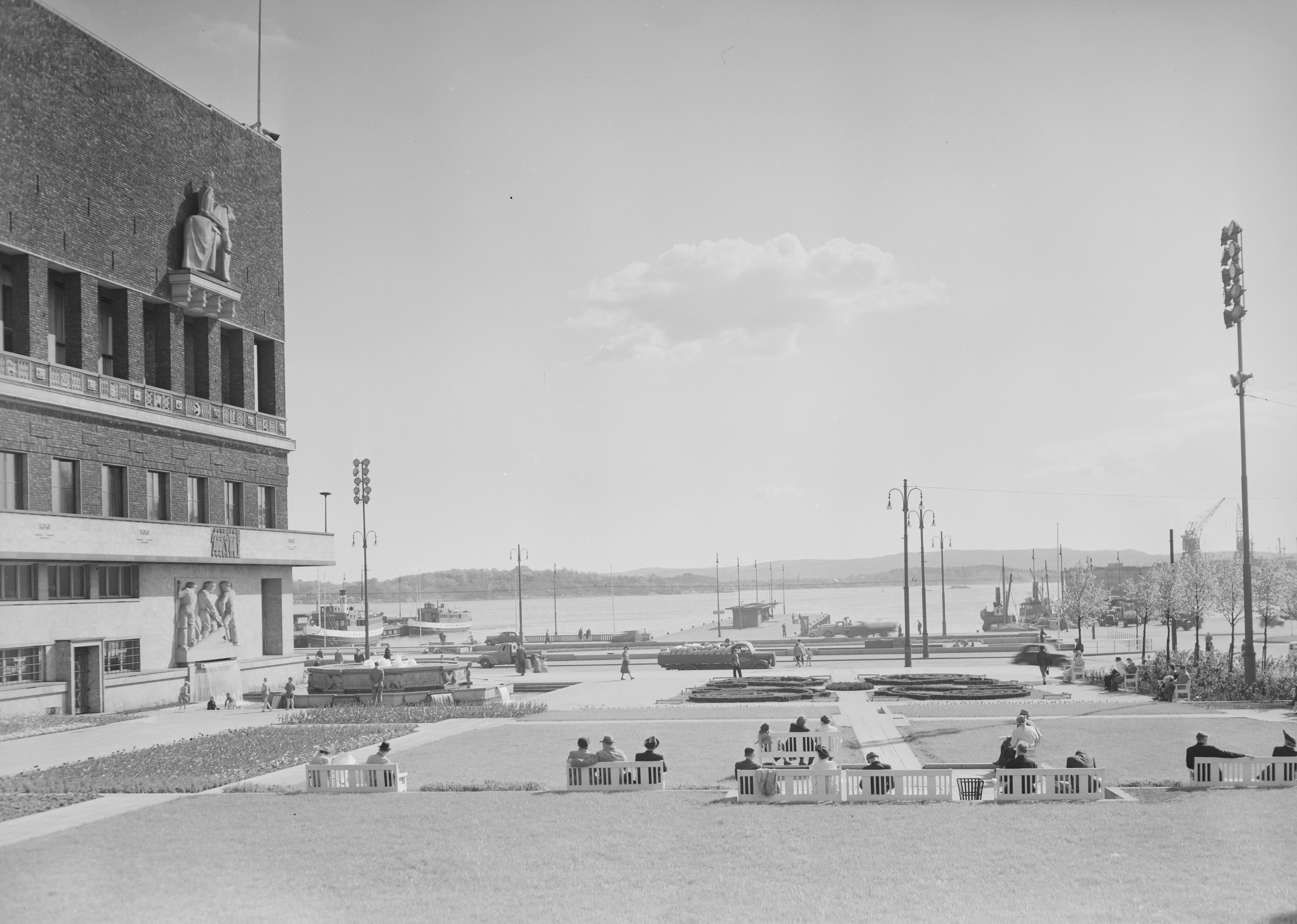 Bildet er hentet fra Nasjonalbibliotekets bildesamling. Anmerkninger til bildet var: Fotograf ukjent Oslo,Pipervika,Rådhusplassen, Oslo, Oslo